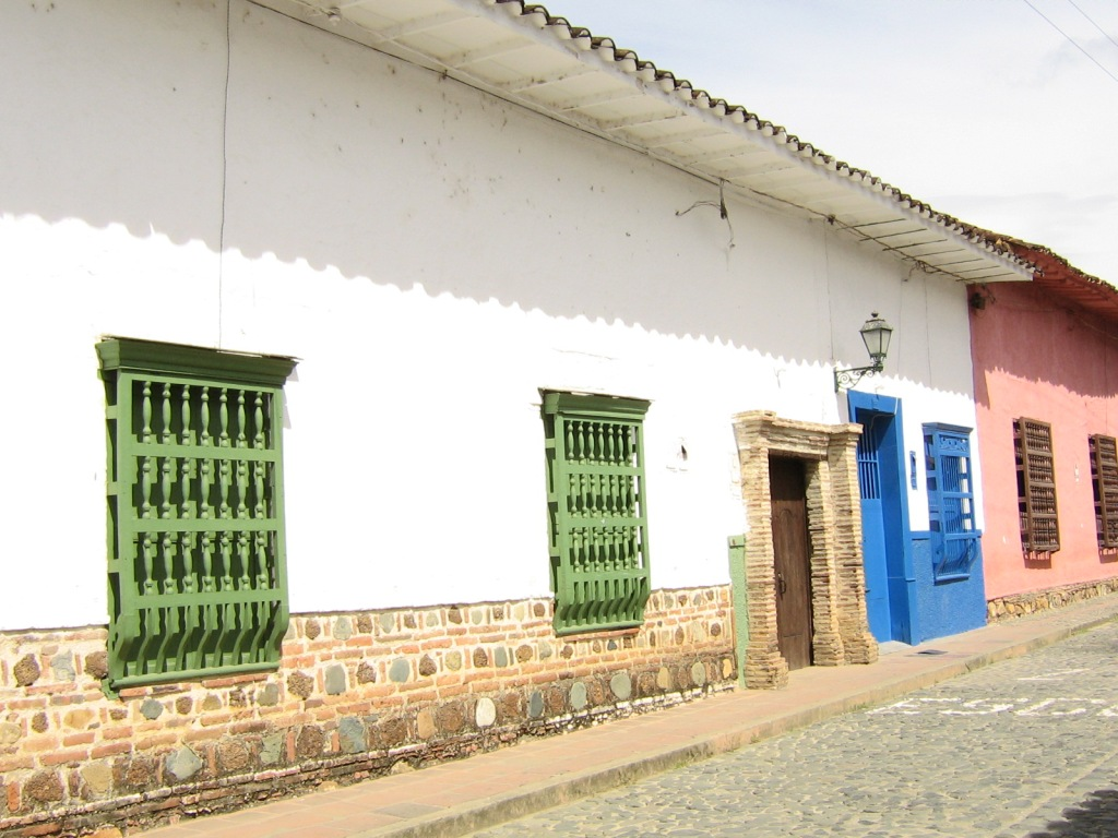 Santa Fe de Antioquia, Colombia